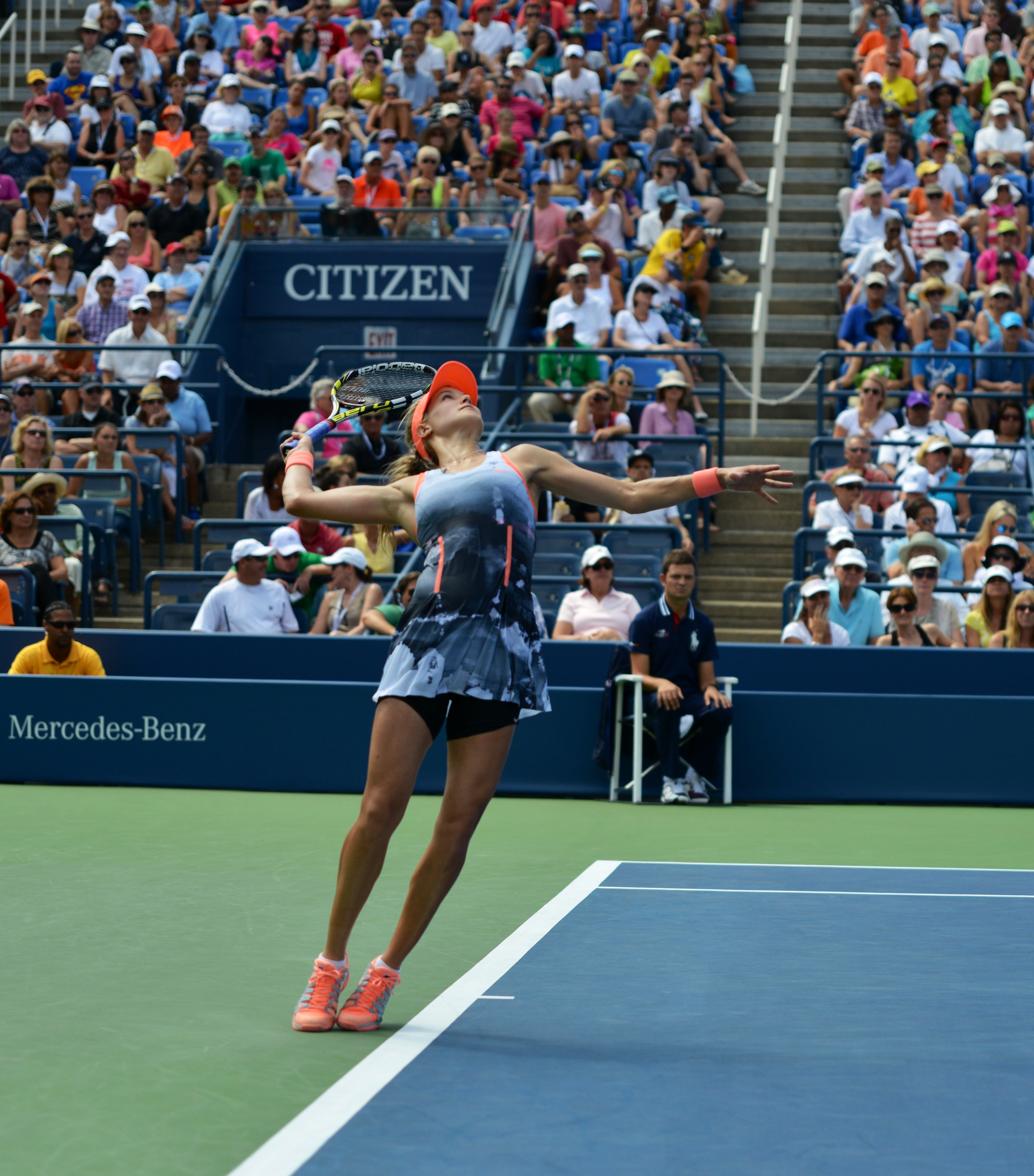 US Open 2013